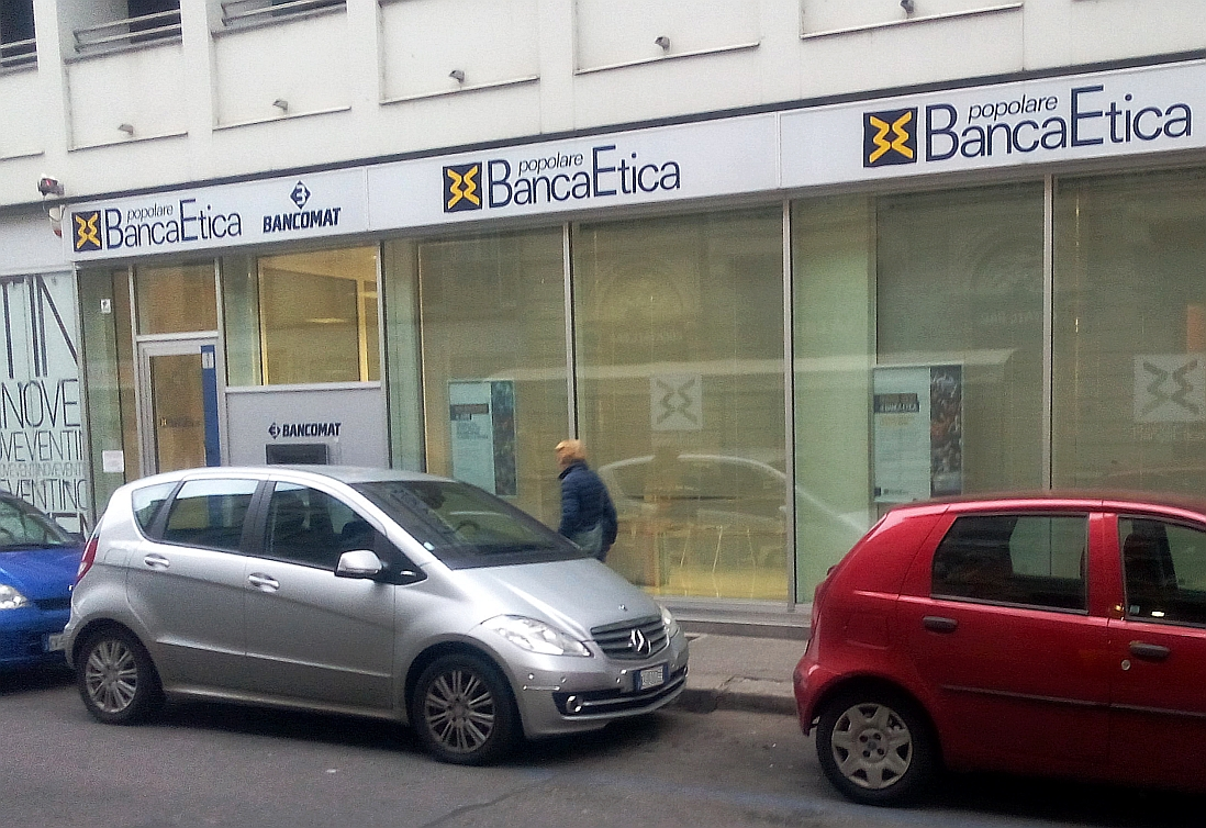 Banca Etica filiale di Torino